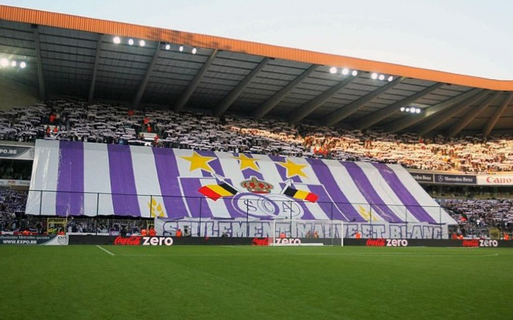 Tifo in het Astridpark